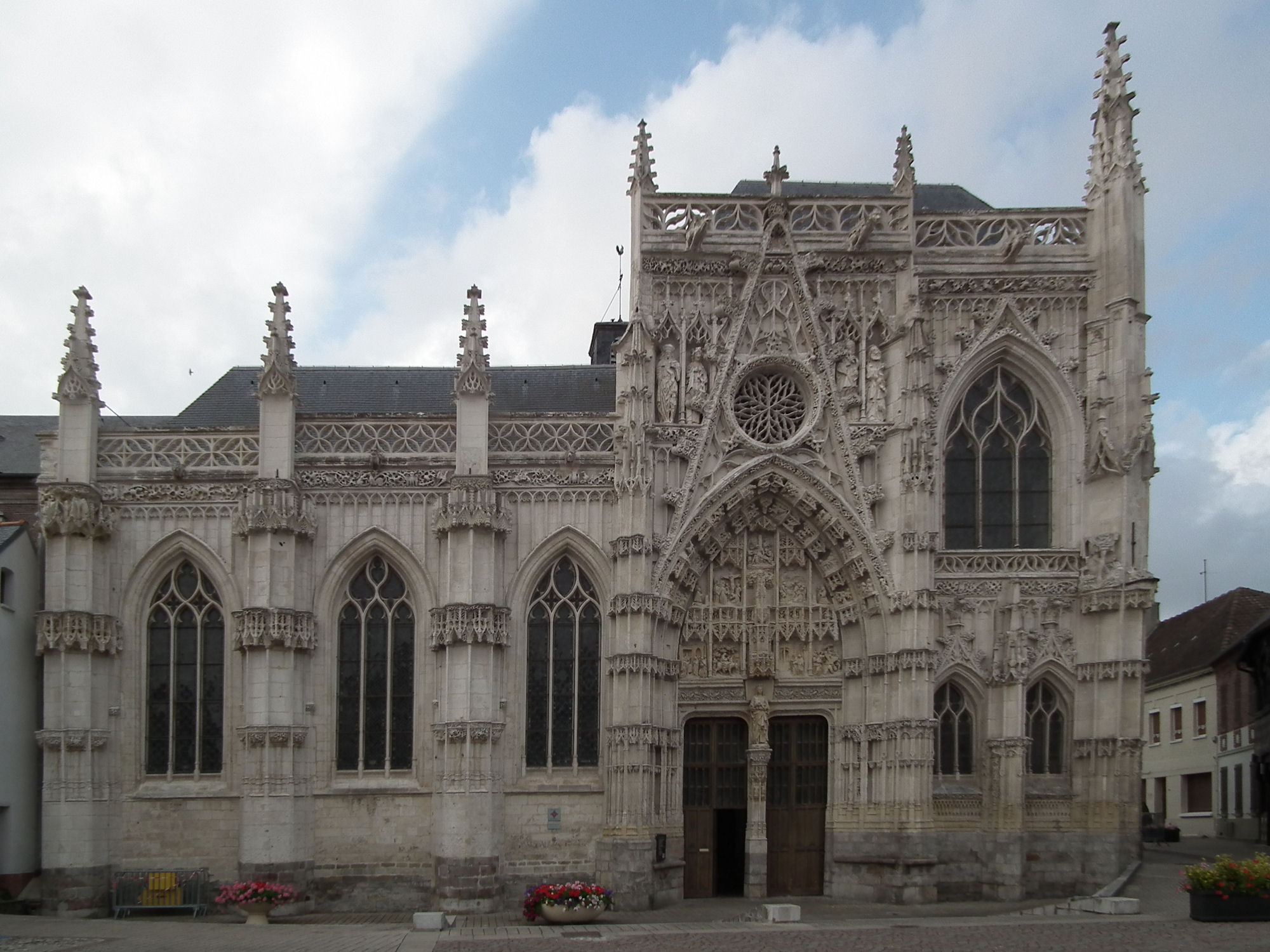 Chapelle du Saint-Esprit, Rue, France